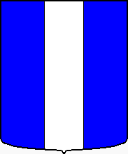 Gemeentewapen Weesp